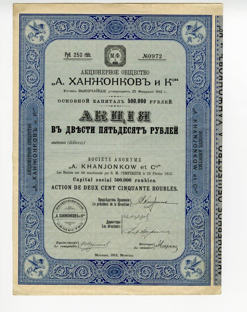 Акция в 250 руб. Акционерного общества «А. Ханжонков и К°» с основным капиталом в 500 тыс. руб. Москва, 1913 г.